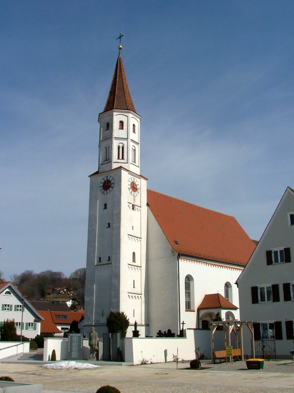 Tussenhausen